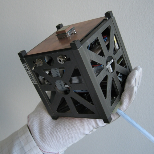 Radiolink test model of BeeSat pico satellite